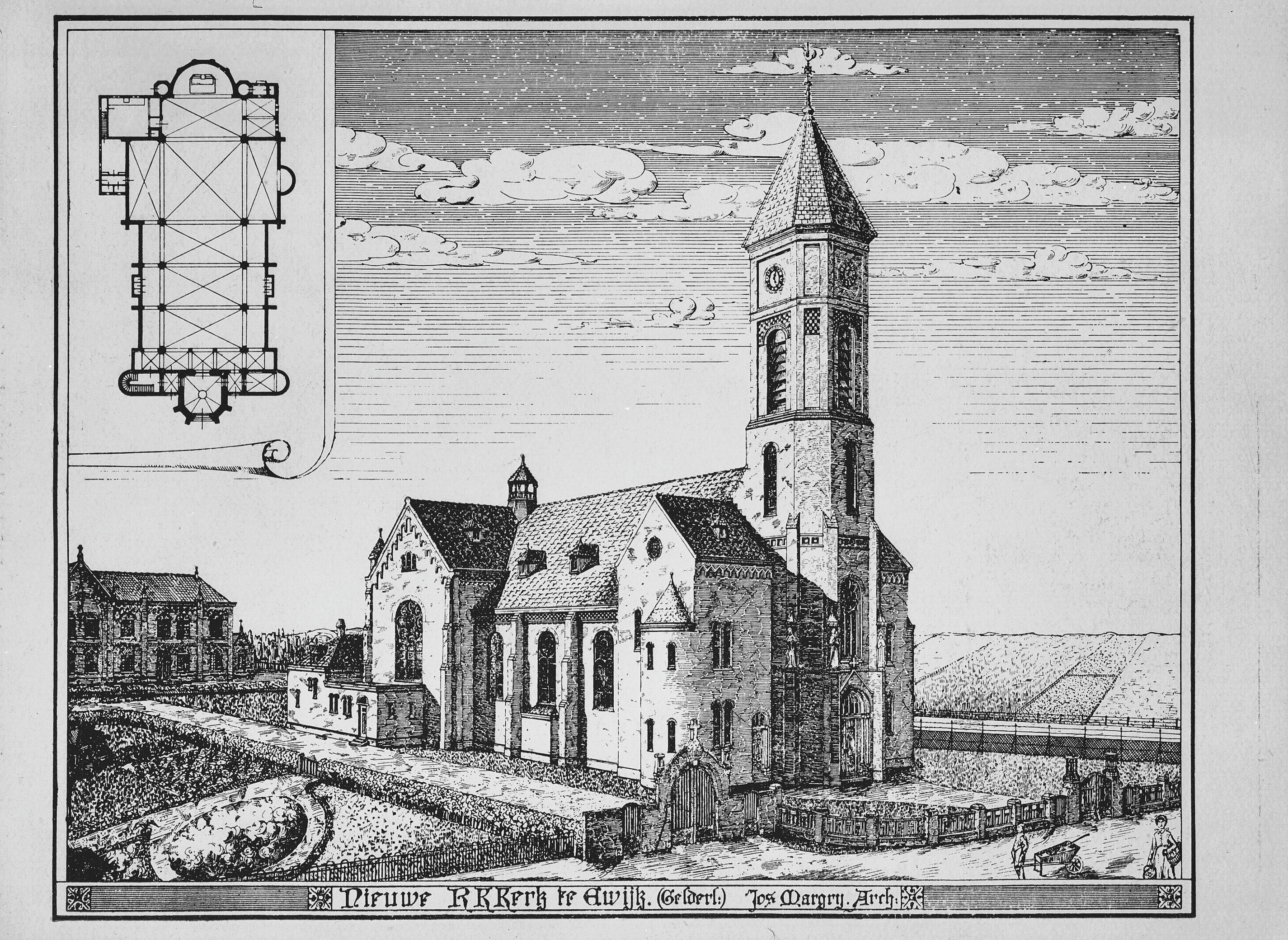 Rooms-katholieke kerk: Tekening van kerkgebouw en plattegrond